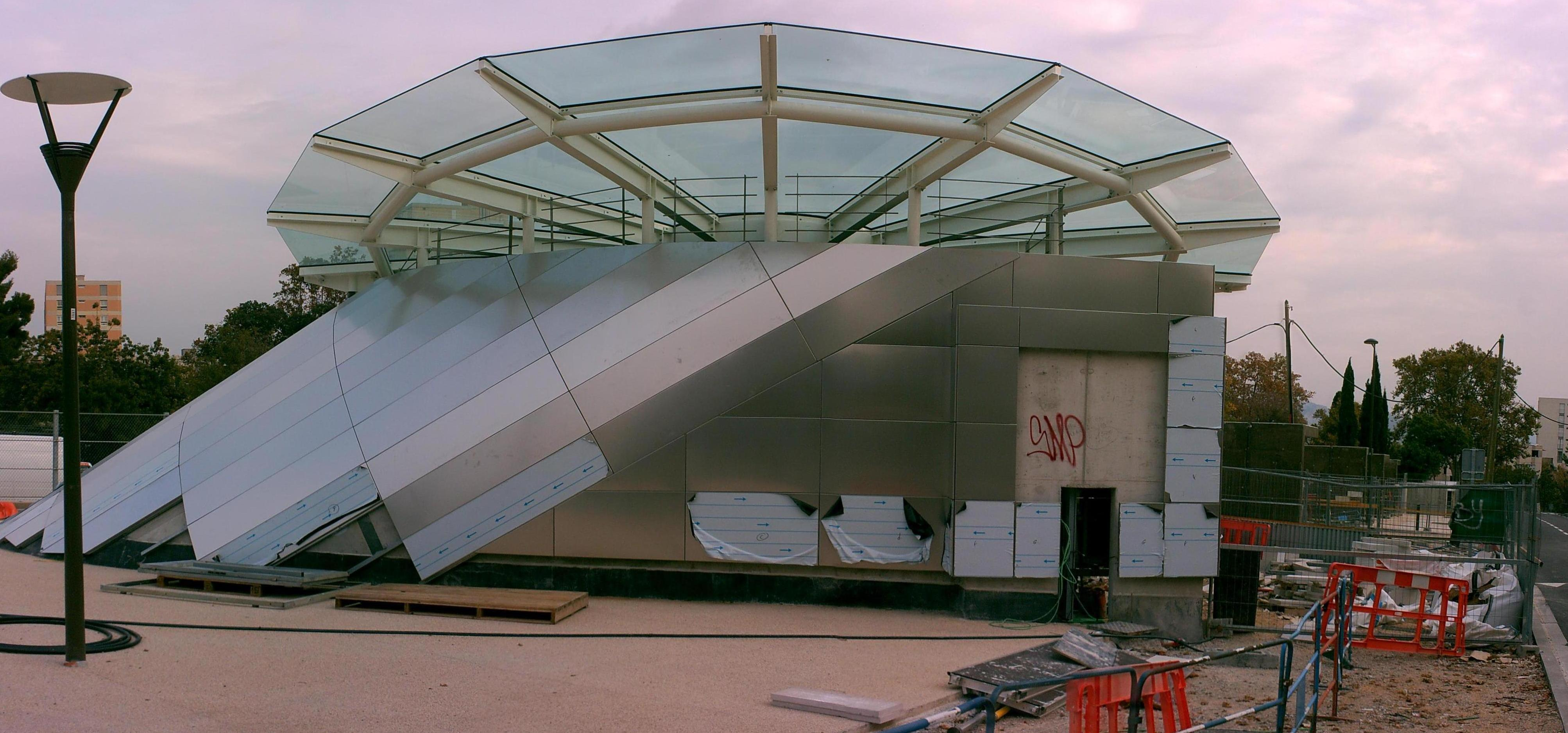 Entrée de la station Louis Armand vue vers l'est en travaux.